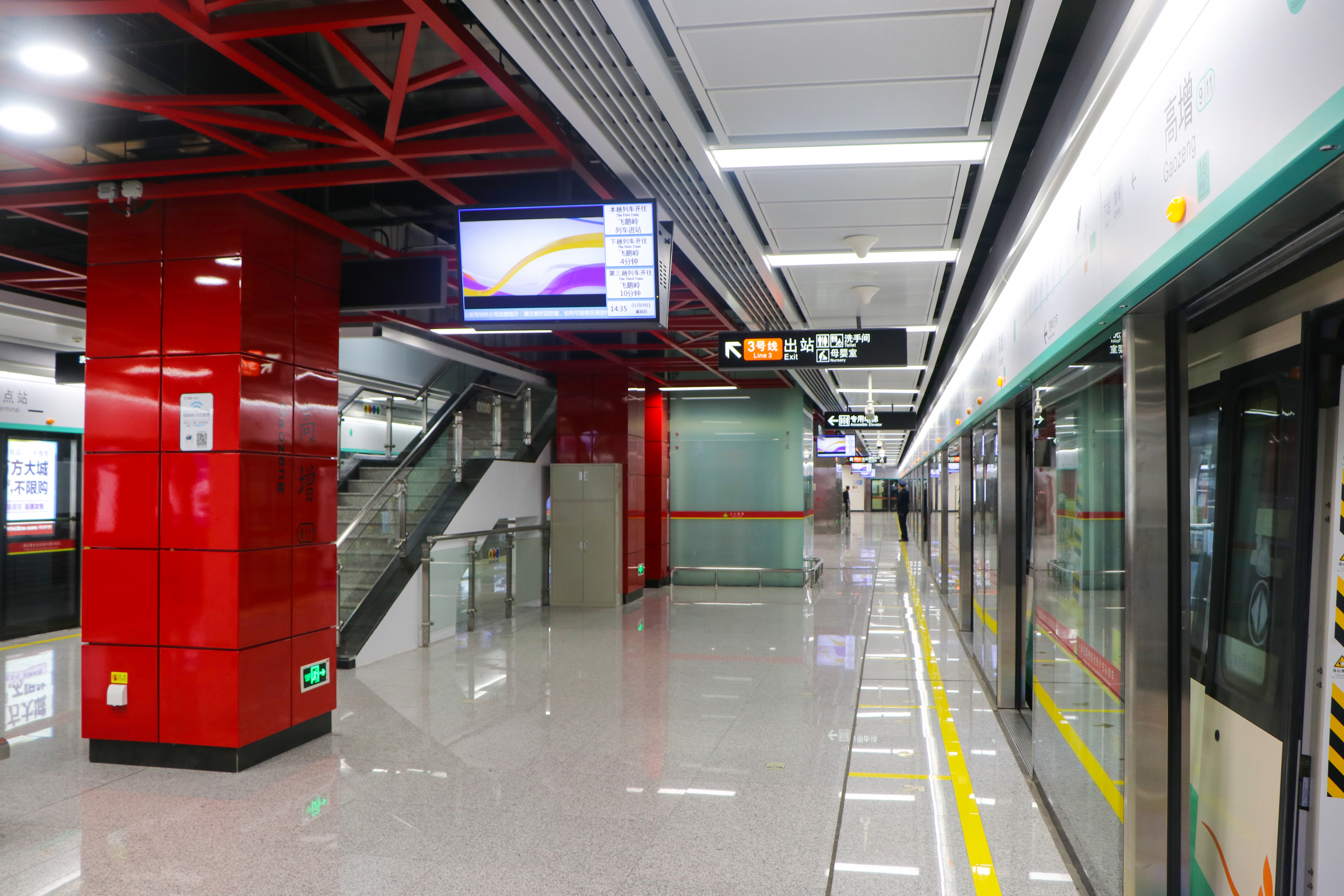 广州地铁高增站